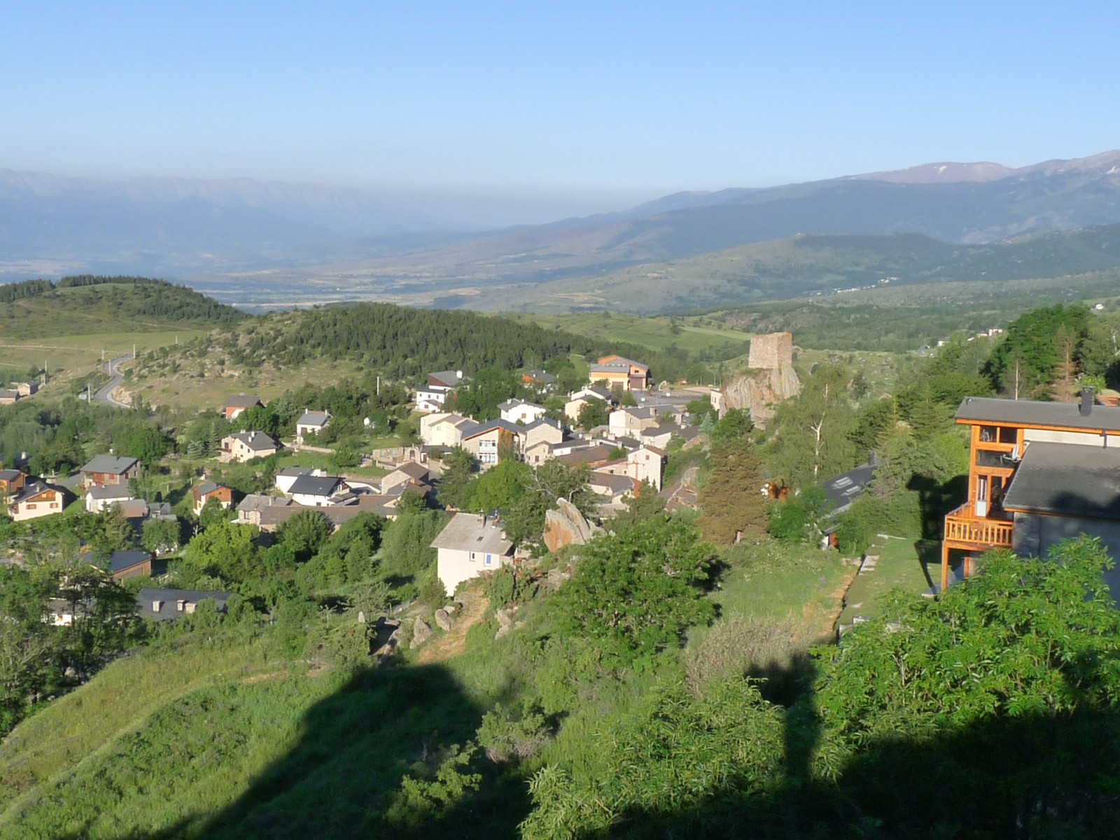 Vue vers Egat depuis la route des Ecureuils, Pyrénées-Orientales, France